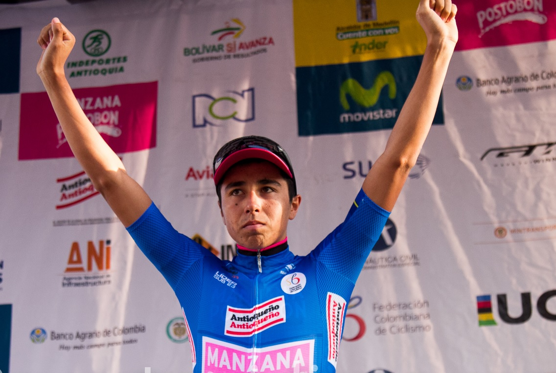 Aldemar Reyes - Lider sub-23 - Etapa 6 Vuelta a Colombia 2016